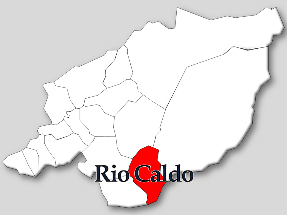 Censos 1864/2011